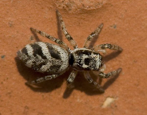 Salticus scenicus (Da: Zebraedderkop), Struer, Denmark